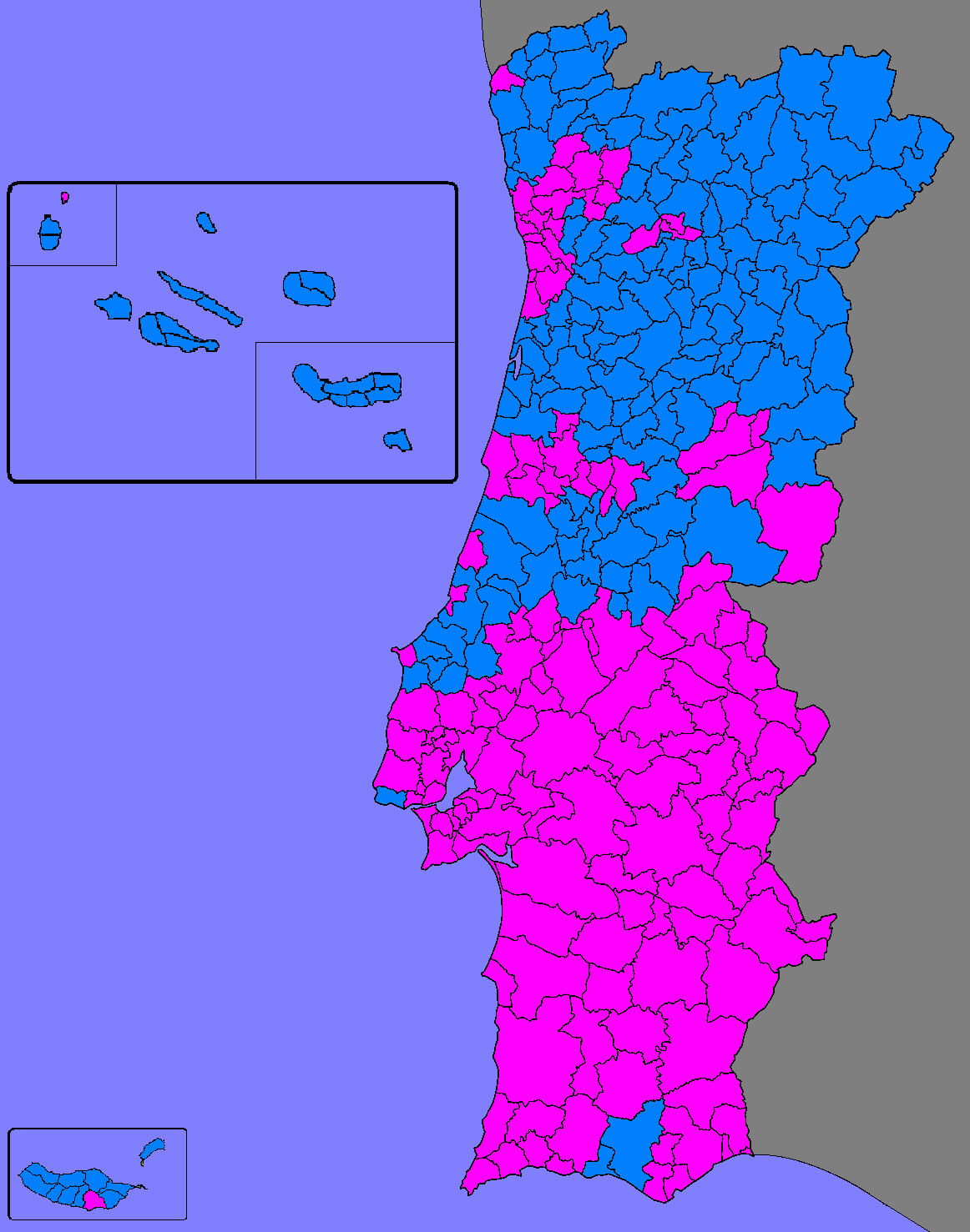 Candidato mais votado por concelho na 2.ª Volta de 1986